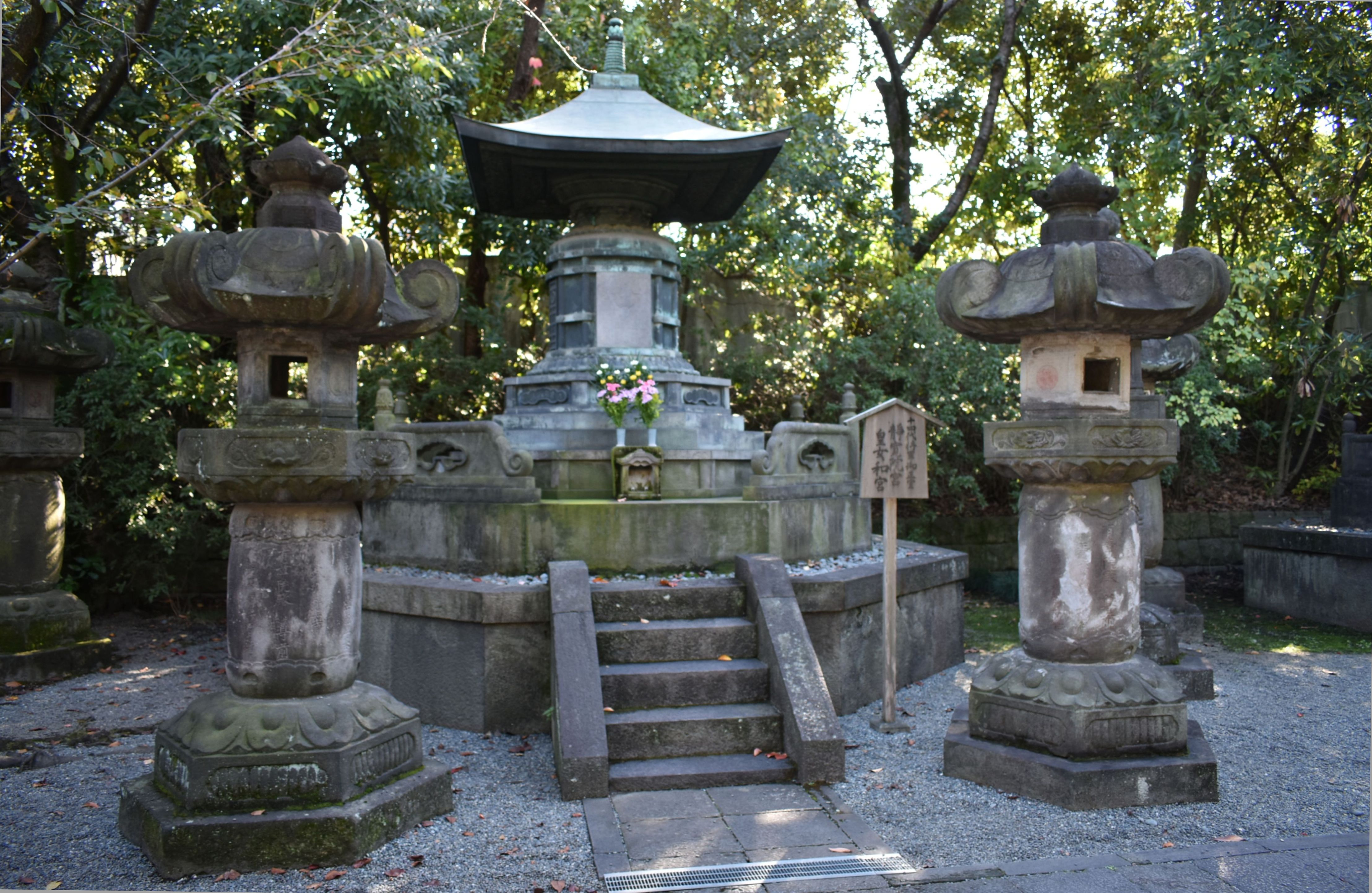 増上寺 御霊屋